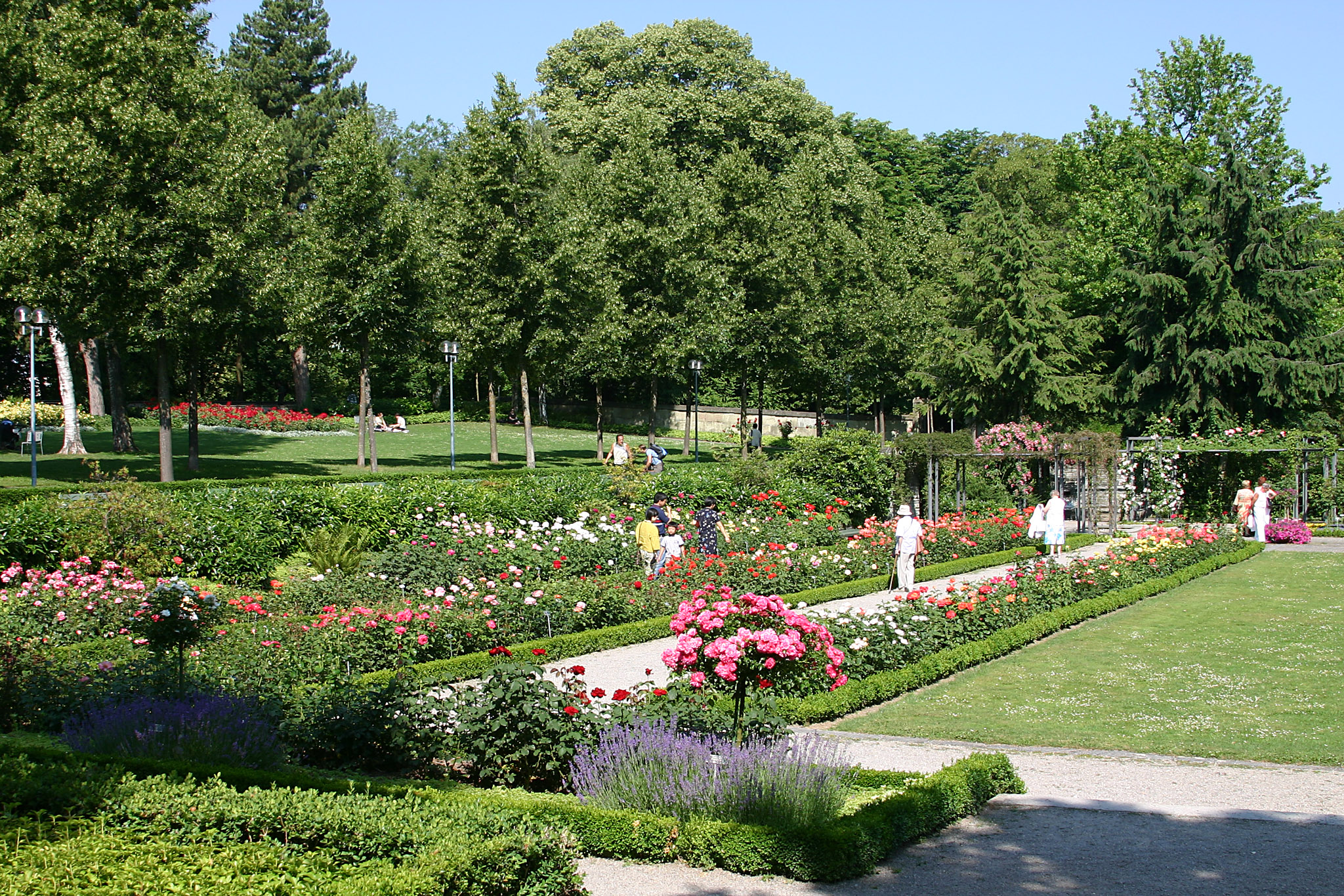 Rosengarten, Bern, Switzerland